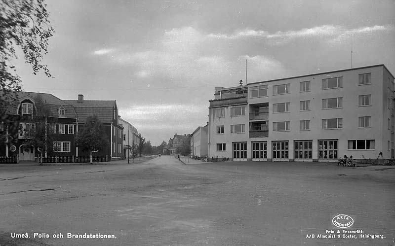 Polis- och brandstationen.; Brandstation; Byggnadsverk; Polishus; Rättsväsen; Samhällsservice och teknisk försörjning